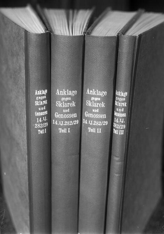 Der kommende Sklarek-Prozess am 13. Oktober spricht Bände! Die 4 Bände umfassende Anklageschrift der Gebrüder Sklarek von insgesamt 2263 Seiten. 600 Zeugen sind zu diesem Prozess geladen.